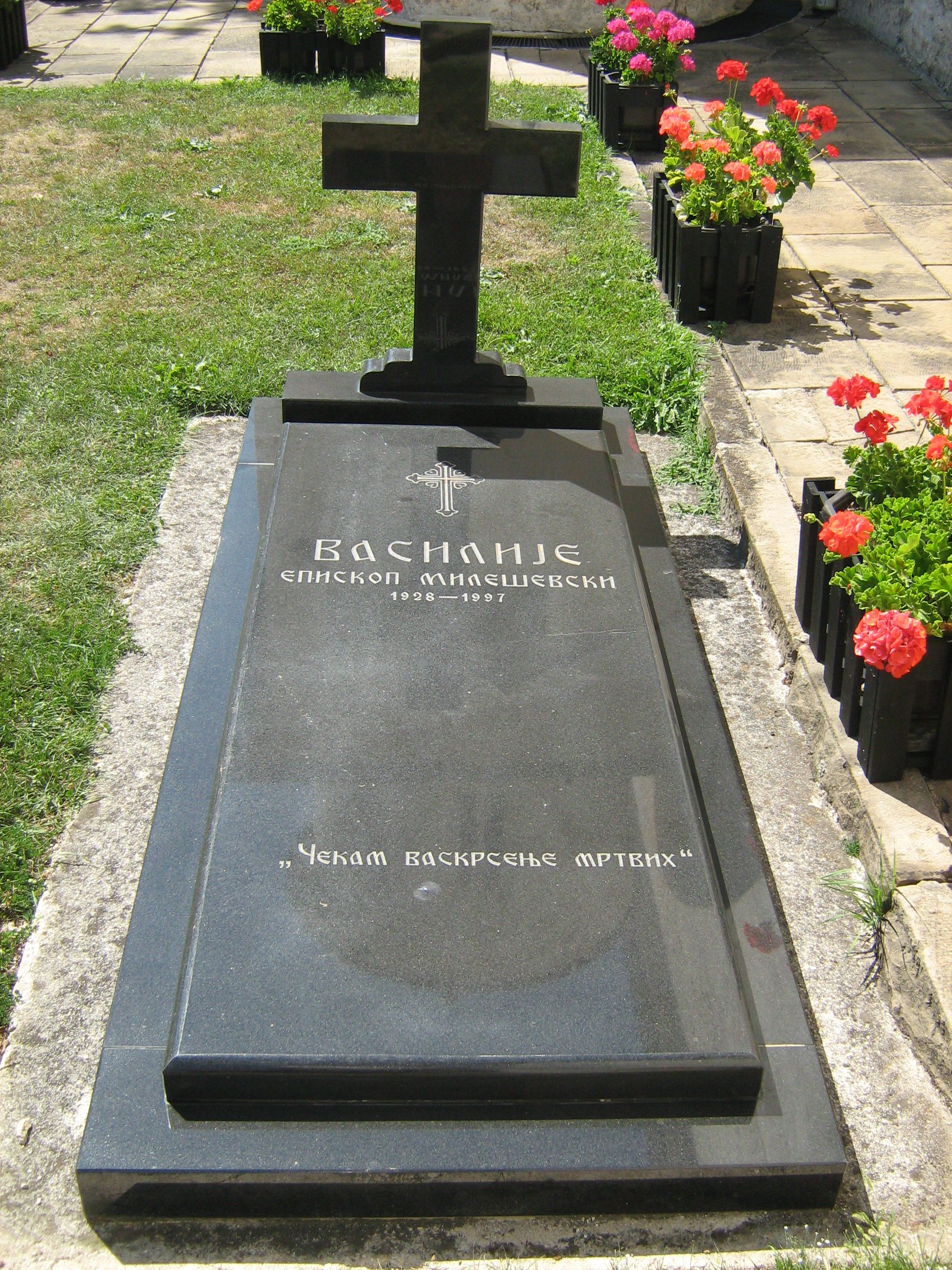 гроб епископа милишевског Василија поред цркве